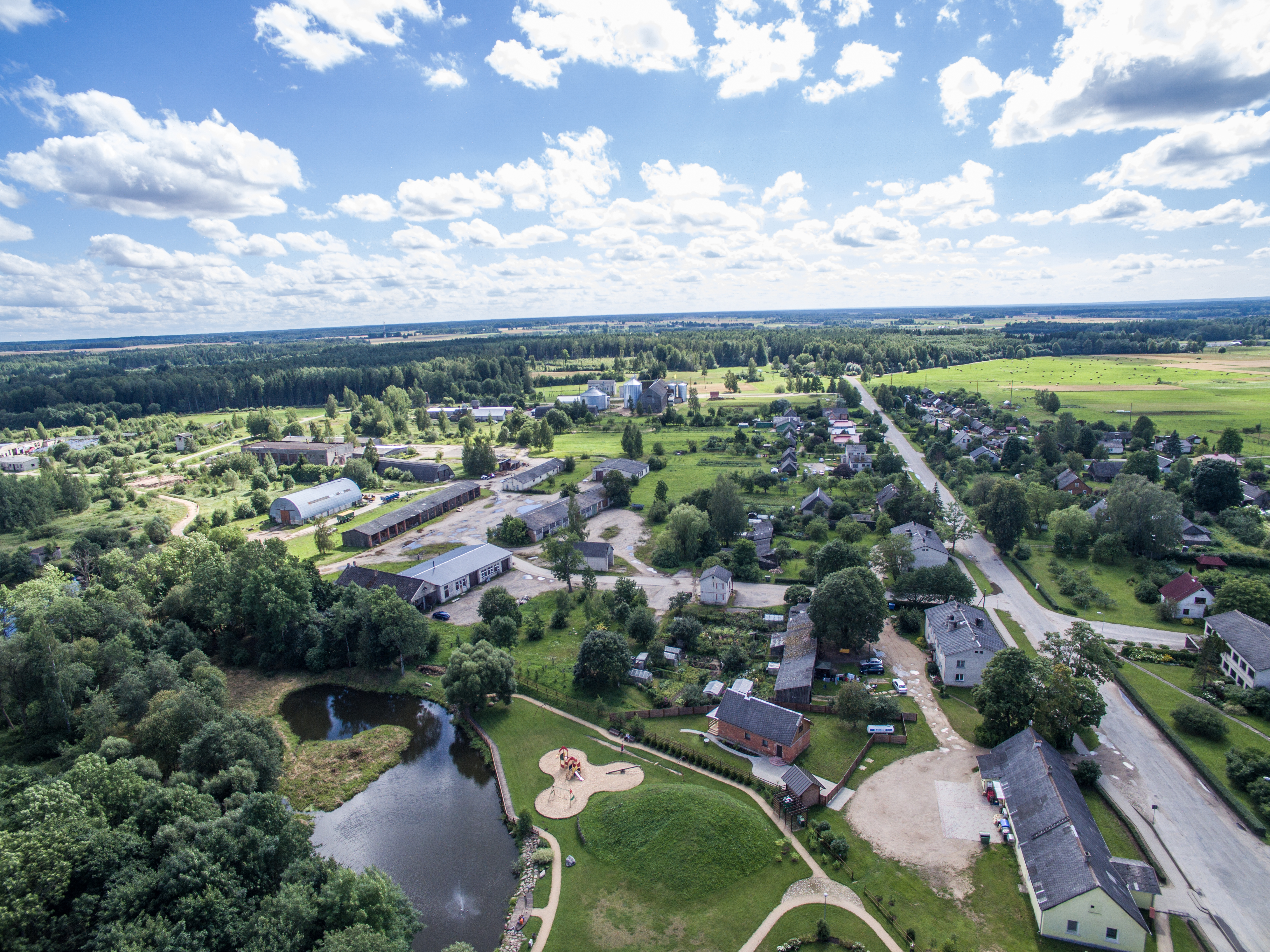 Vārme, Vārmes pagasts, LV-3333, Latvia